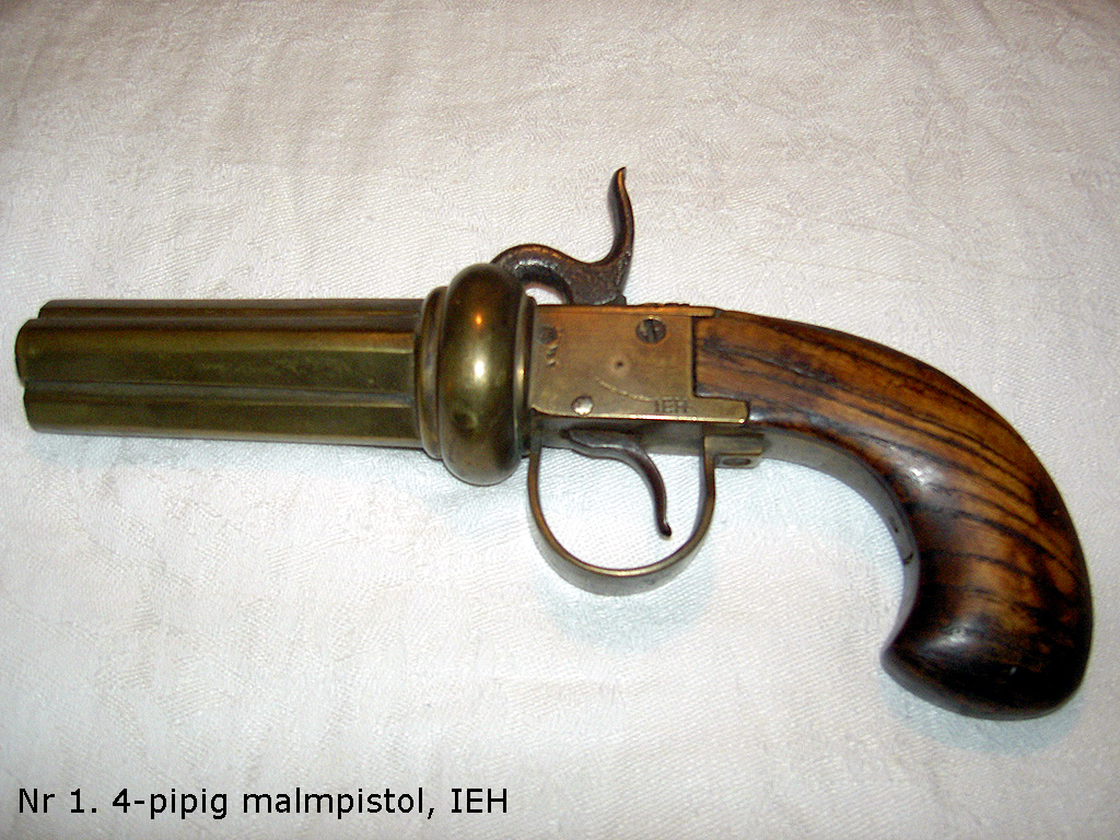 4-pipe Johan Engholm gun (IEH)